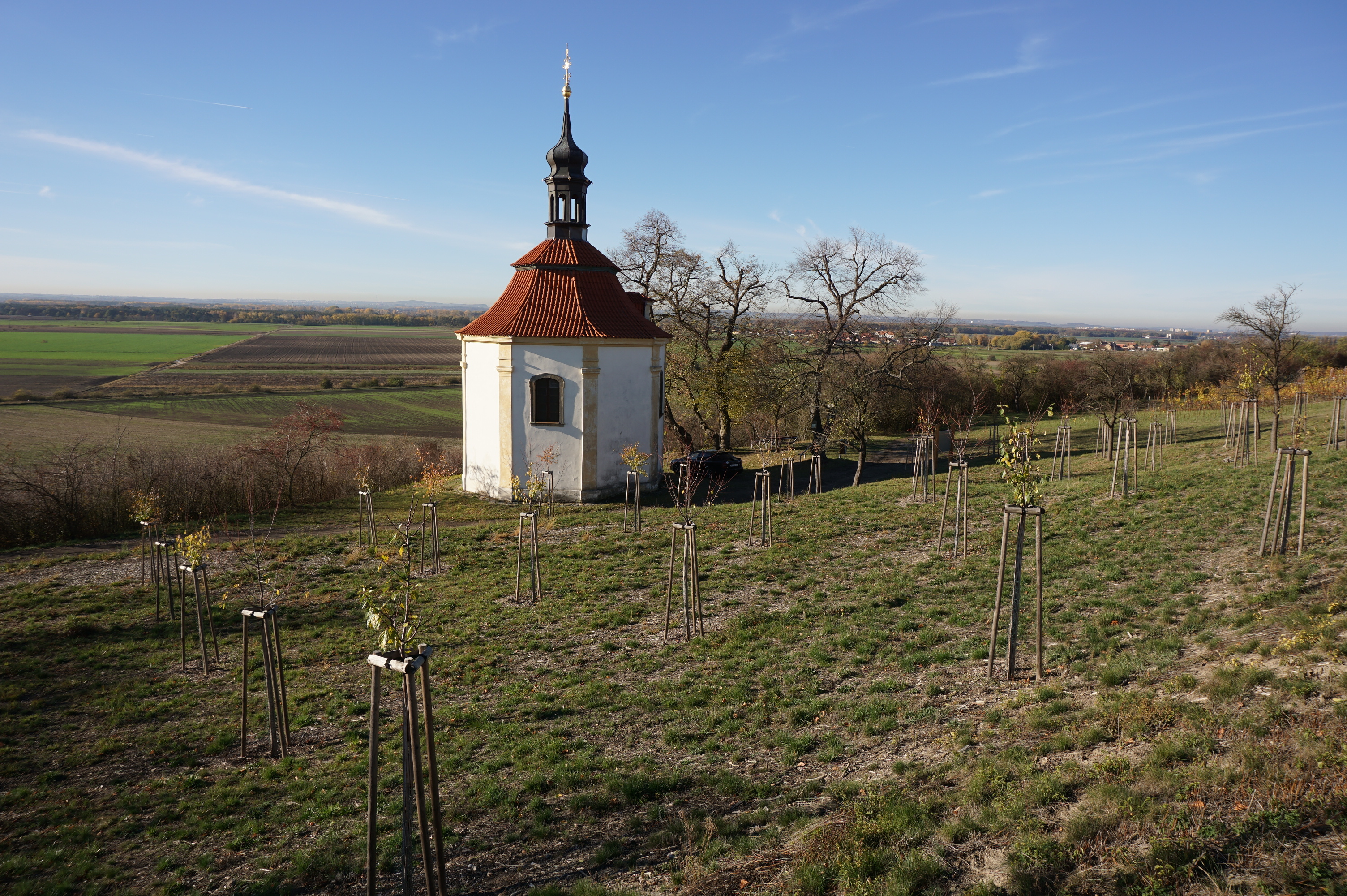 Kaple Stětí svatého Jana Křtitele, Dřísy.